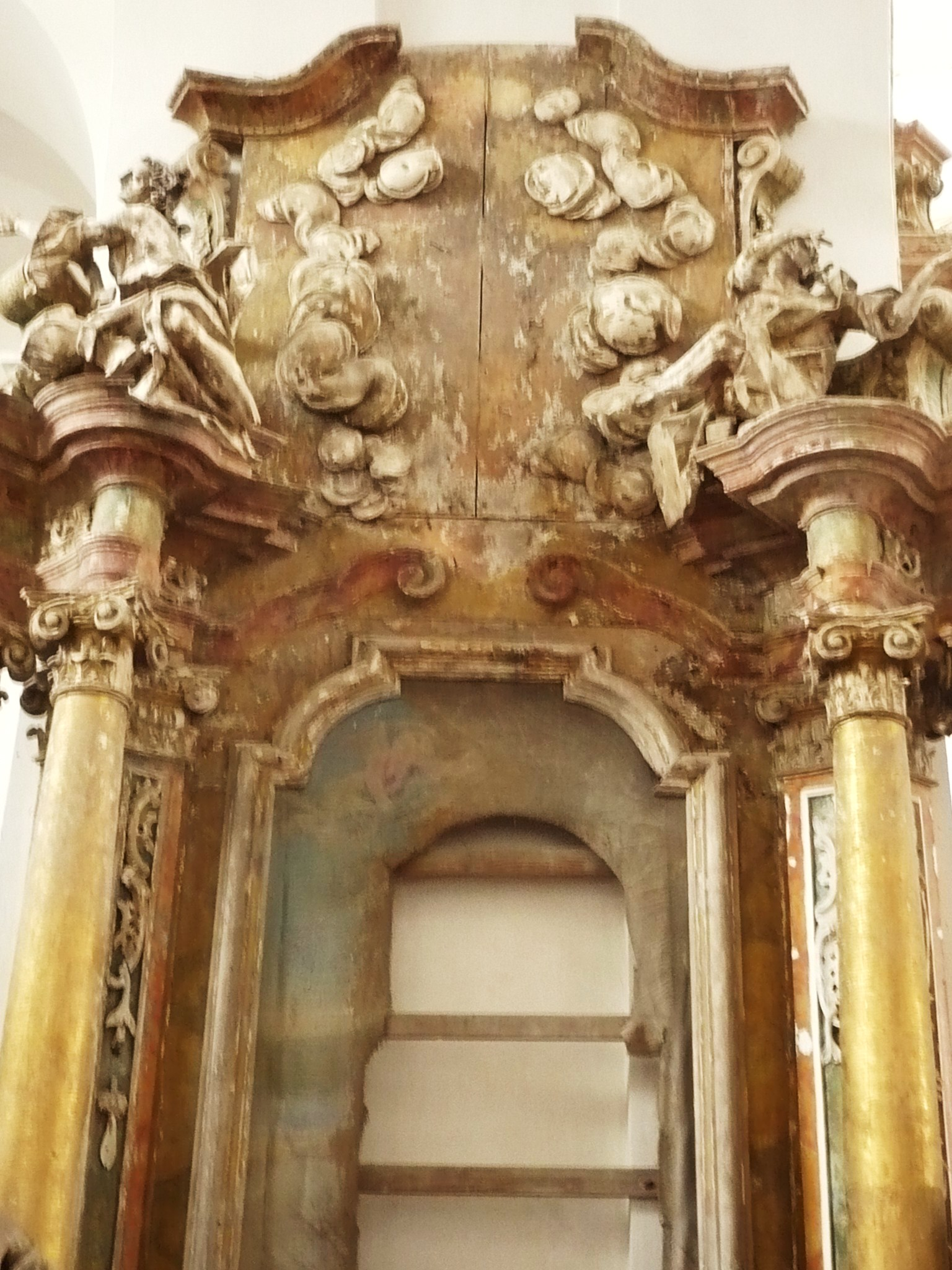 Zbaraż, kościół oo. bernardynów